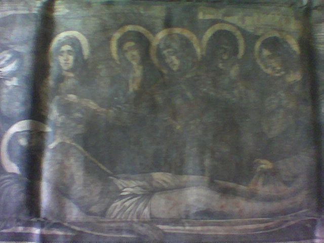 Antimension / Antimis / Αντιμενσιον. Consacré par Mgr Michel Paul, Oradea-Mare (Transylvanie), 1890.